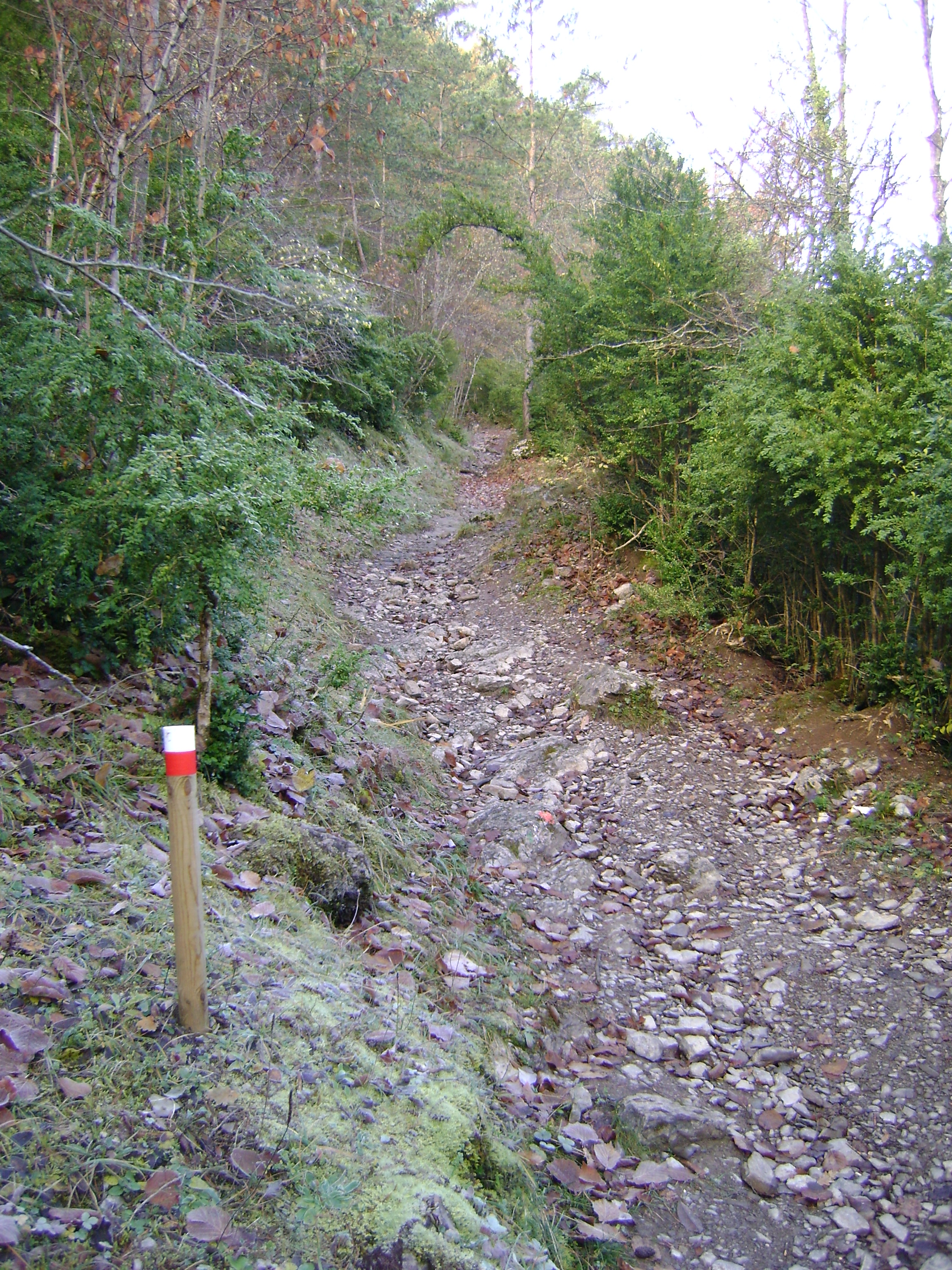 Señal en el camino, justo passada la Font Nostra. En el Cadi-Moixero, tramo Baga-Gósol, 06-11-09